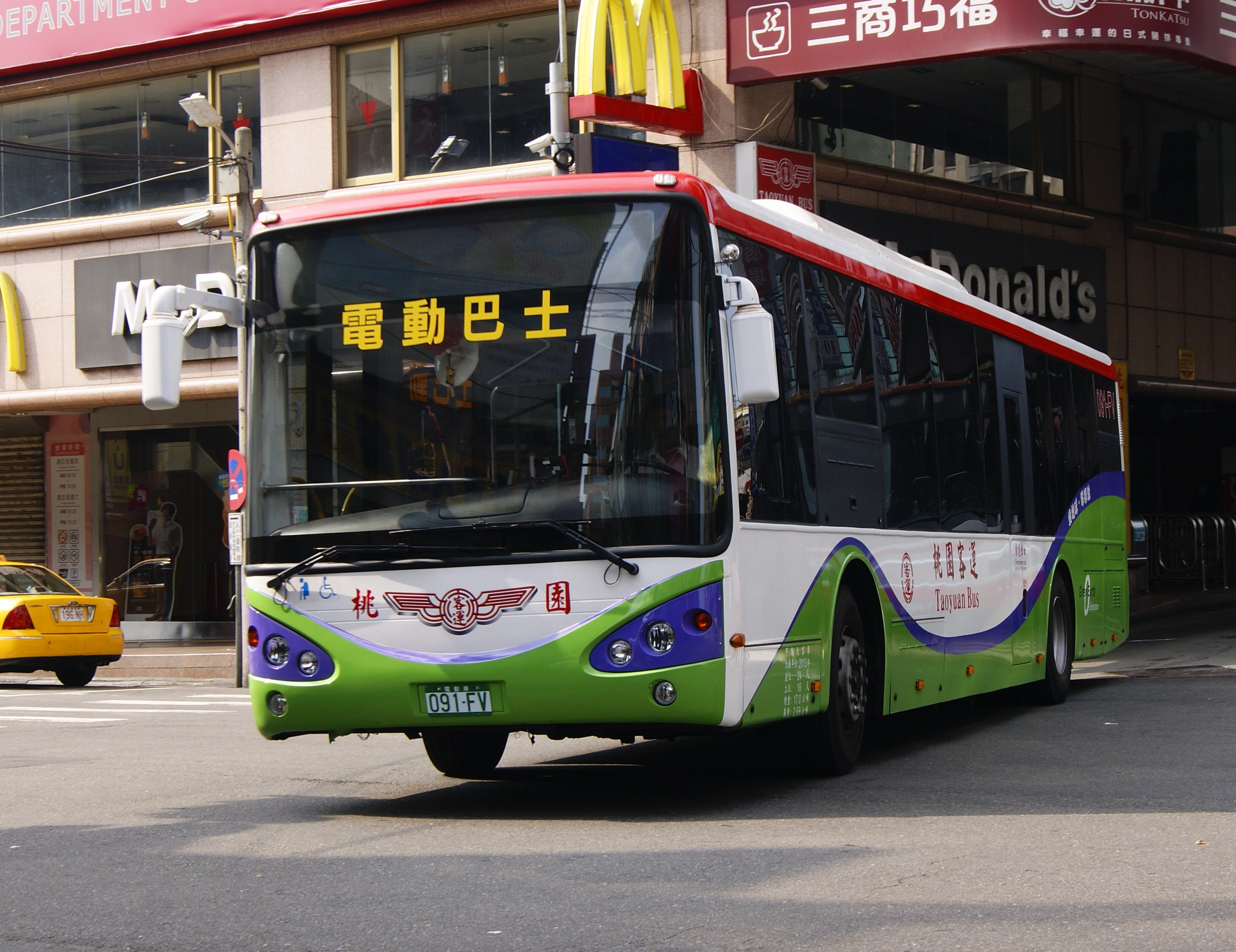 桃園客運申沃純電動低地板公車